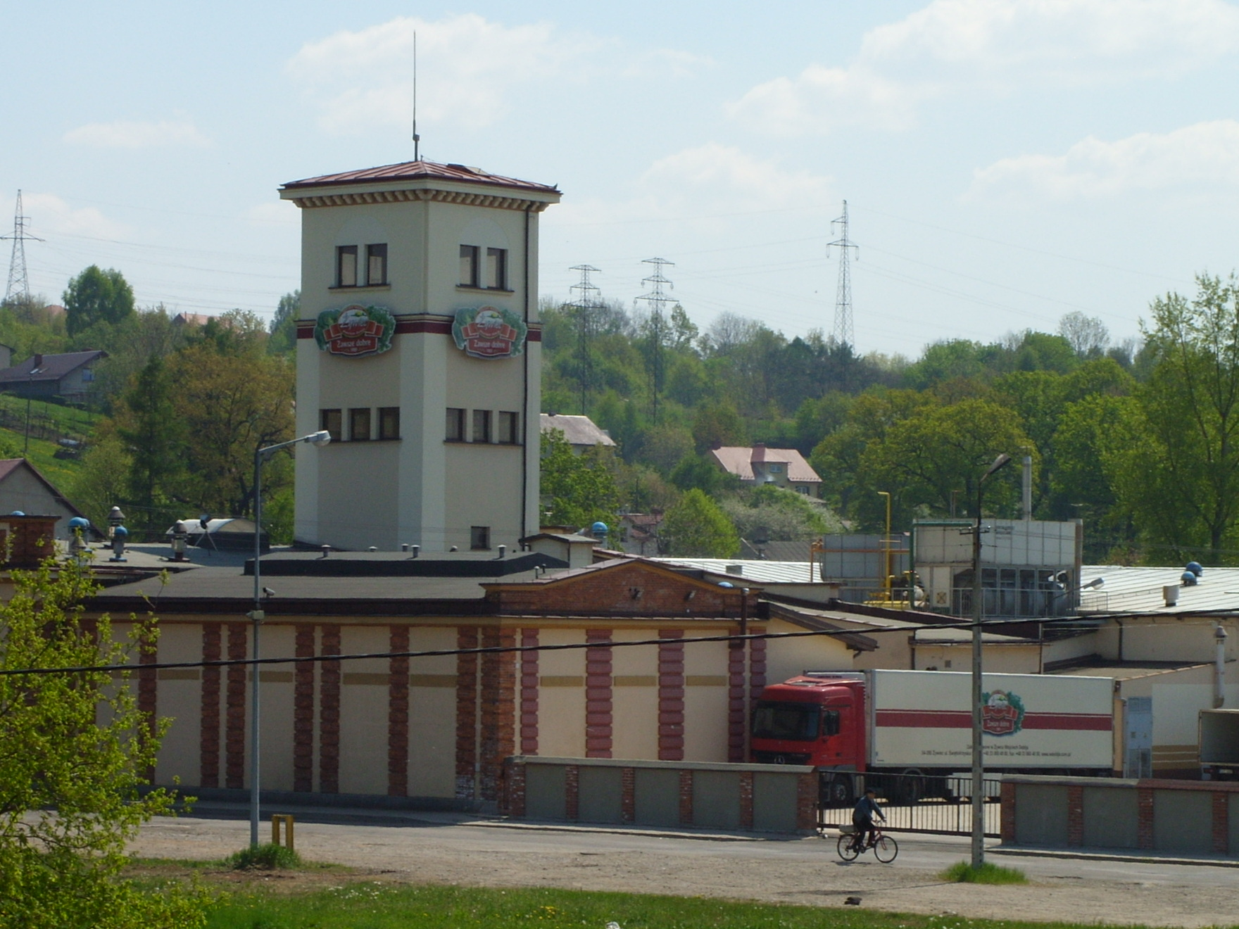 Zakłady Mięsne Żywiec